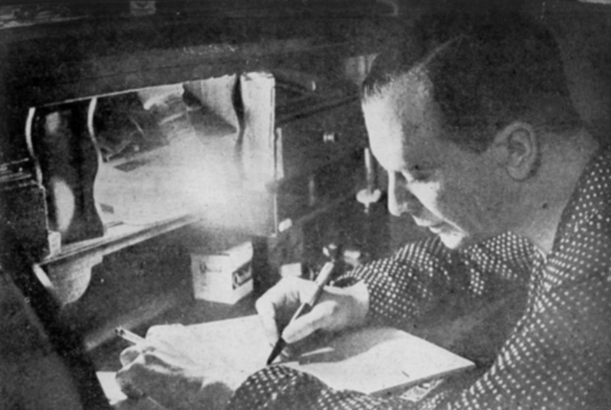 O ator e compositor brasileiro Mário Lago (1911-2002), em 1945.